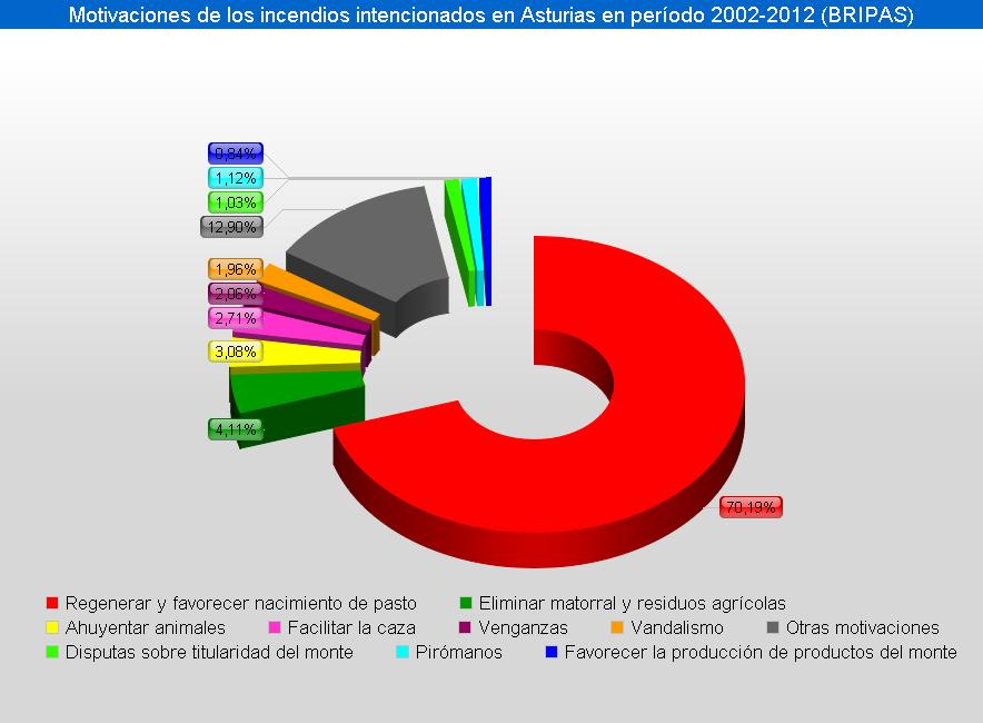 Motivaciones de los incendios intencionados en Asturias en el período 2002-2012 (Bripas)